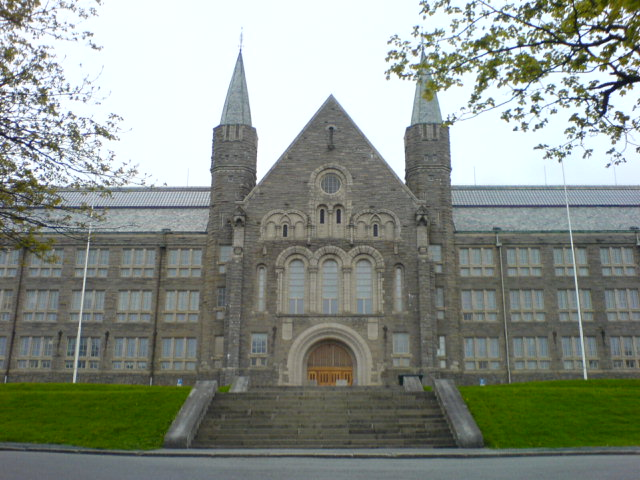 Hovedbygget på NTNU.